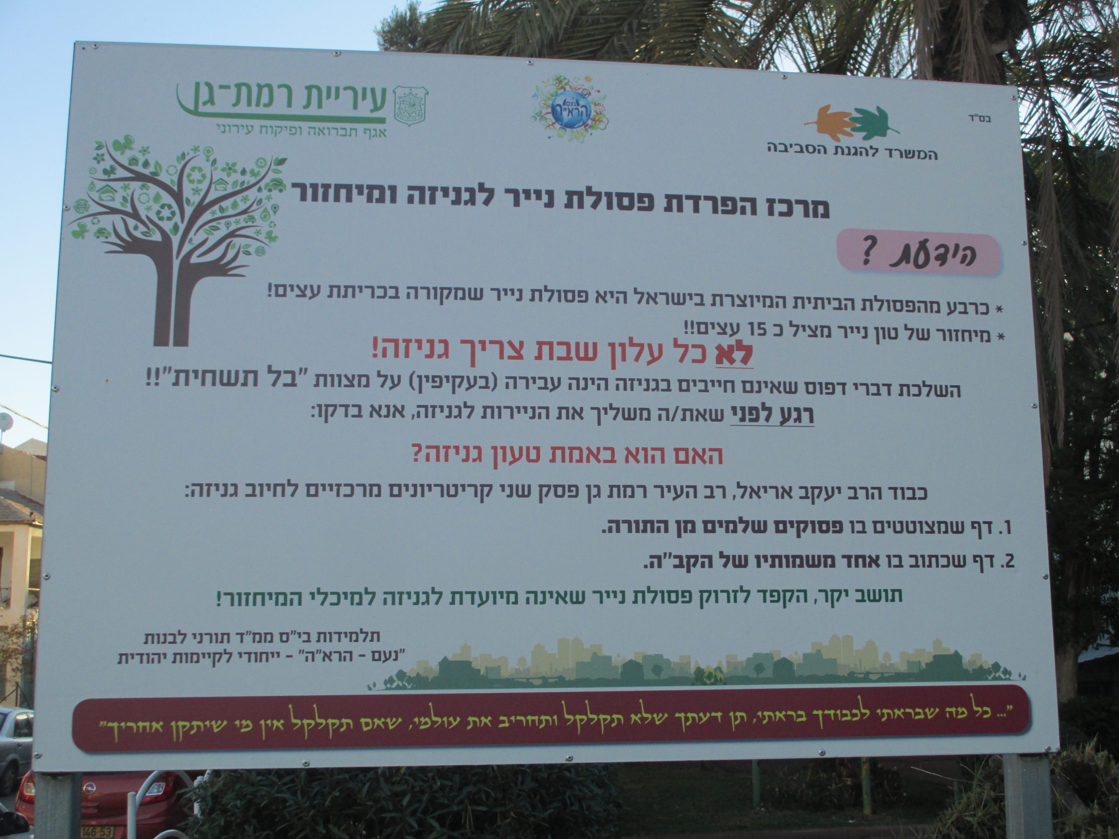 שלט הסבר בנוגע לגניזה ברמת גן